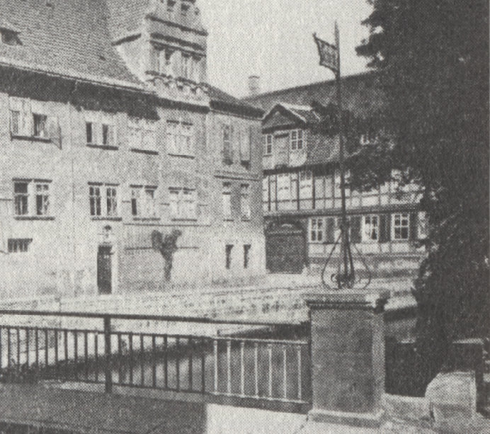 Blick auf Klink 10, Ausschnit aus einer Meßbildaufnahme von 1893